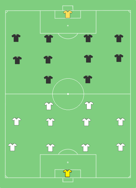 Alineaciones ida de la final apertura 2011